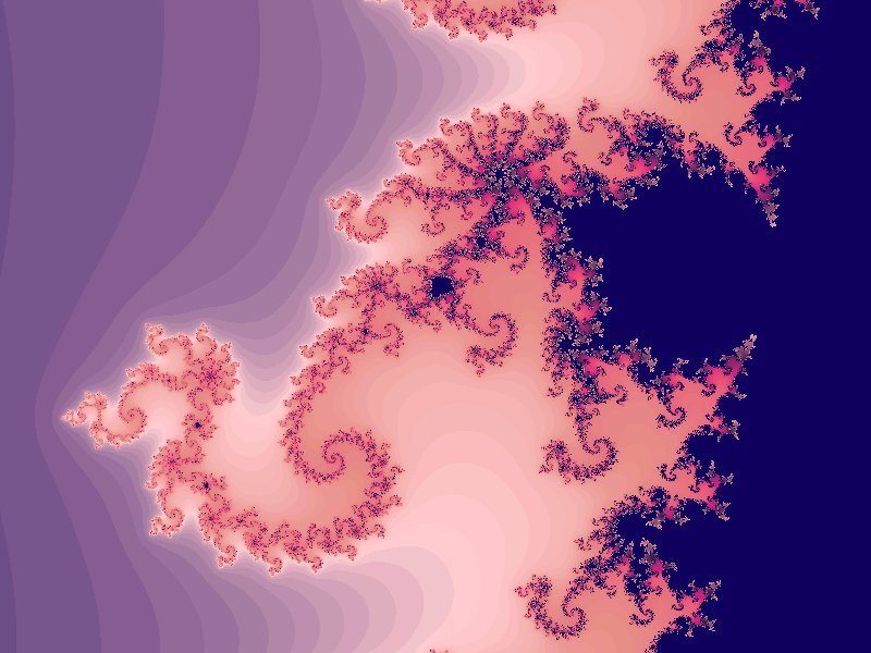 fractal matemático